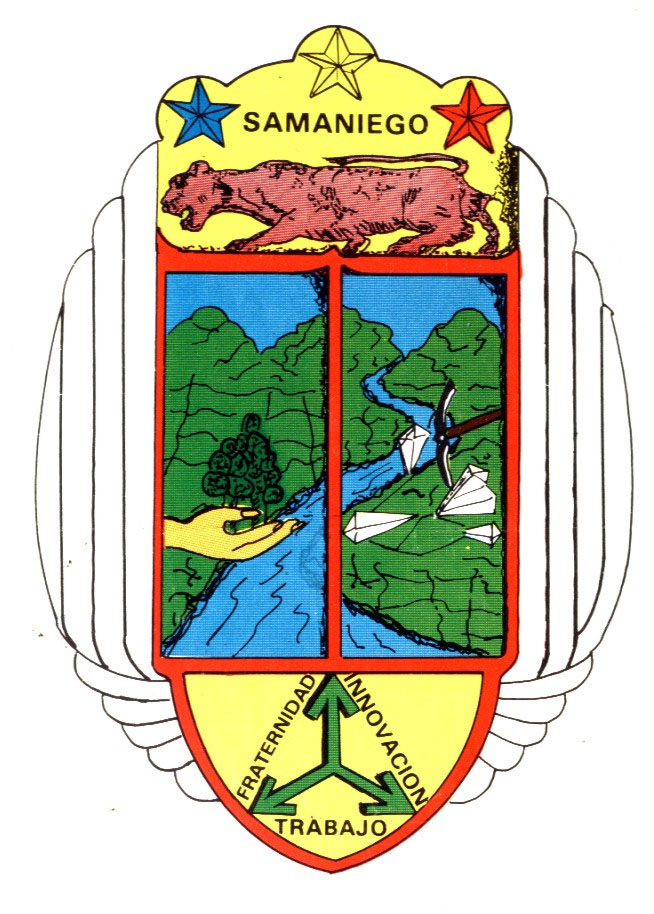 Escudo del municipio de Samaniego